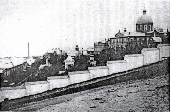 Самара. Иверский женский монастырь. Вид с южной стороны, за каменной уступчатой стеной видны часовни над могилами